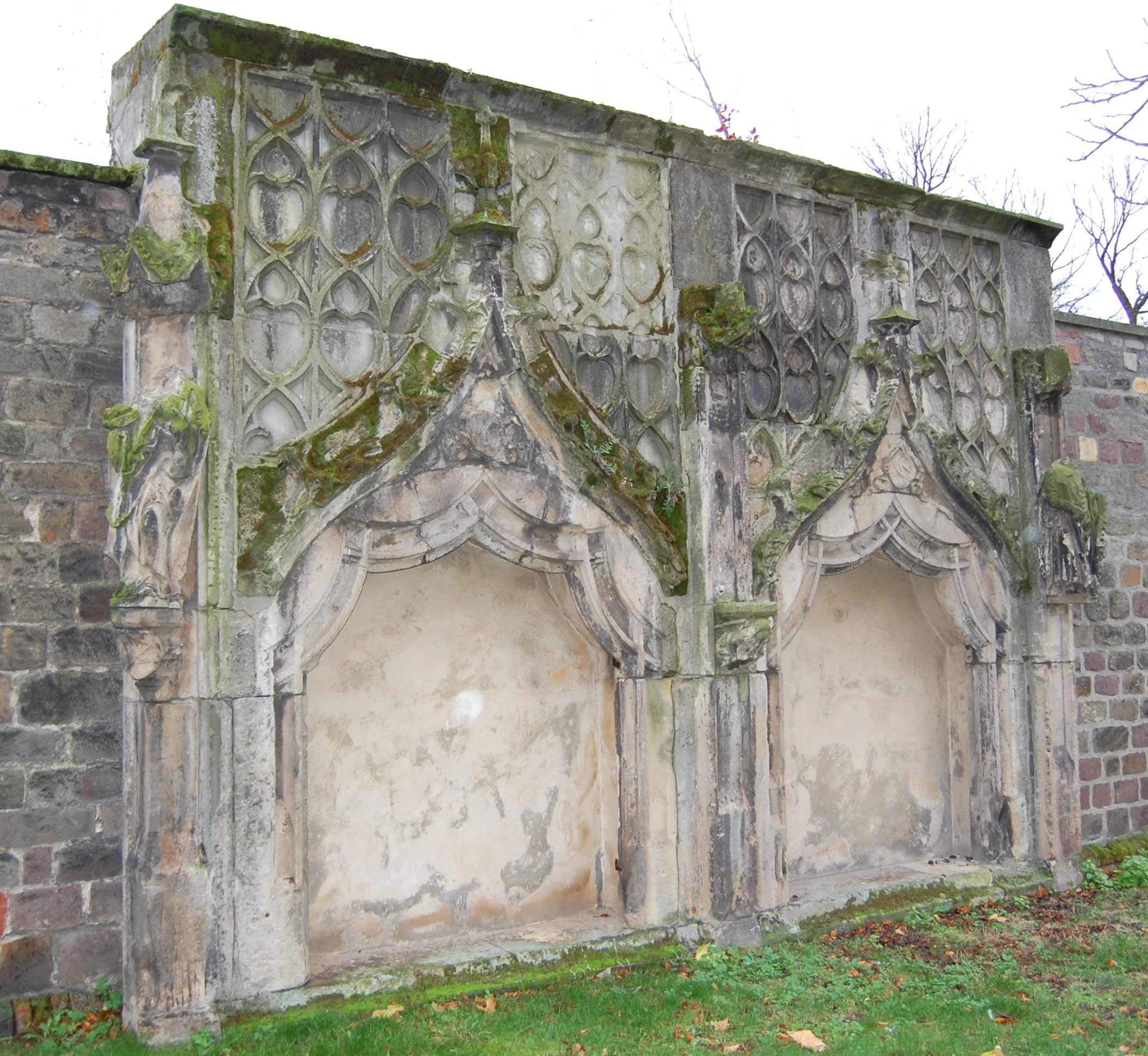 Fragmente der Wallfahrtskapelle zum Ölberg in Magdeburg